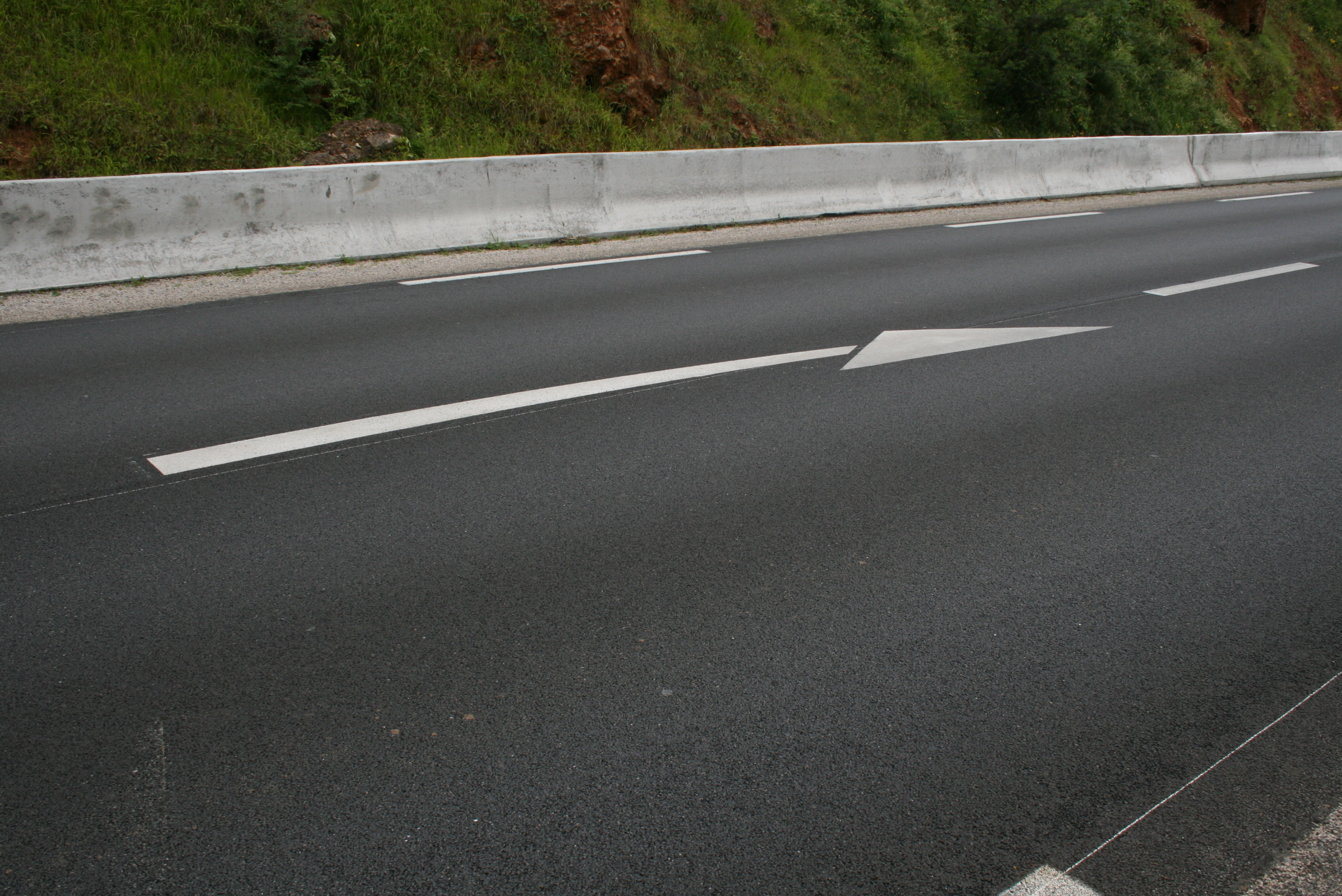 Flèche de rabattement en France